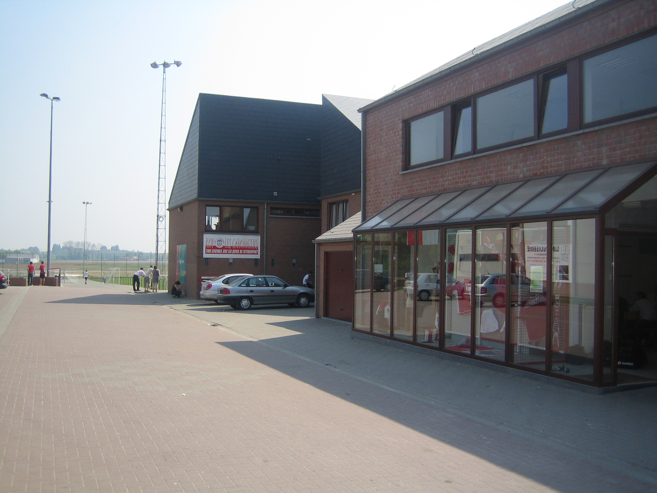 Les batiments du Futurosport(Conciergerie et Cafétaria)